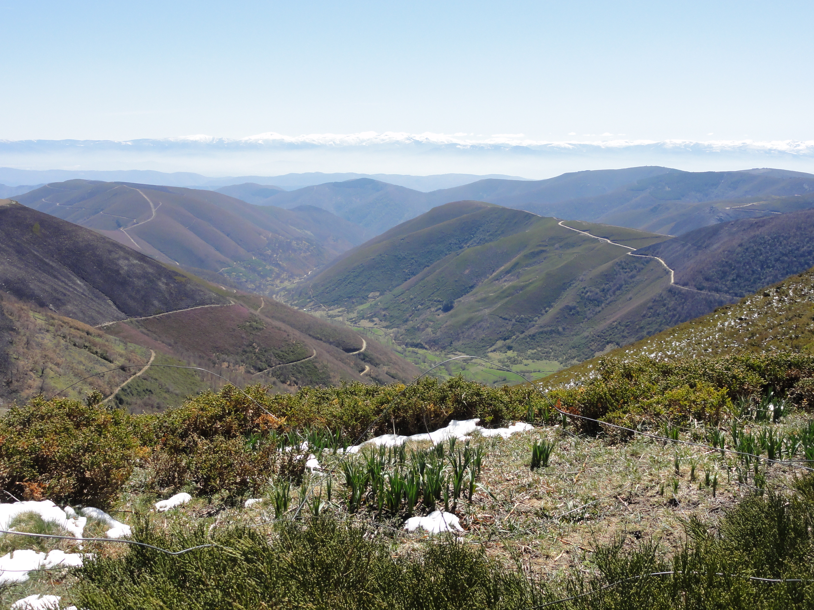 Vistas desde el Pena Rubia This is a photography of a Special Area of Conservation in Spain with the ID: ES1120001. Natura2000 entry, EEA entry